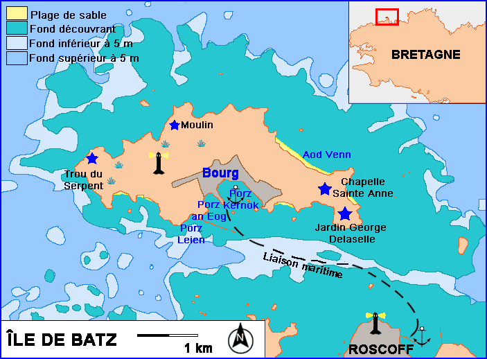 Description : Carte sommaire de l'île de Batz Date : 2006 Lieu : Ile de Batz, France Author : Réalisation Pline